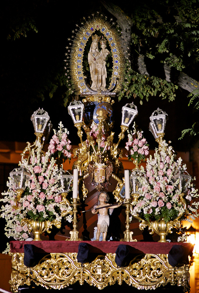 Ntra. Señora de los Milagros, patrona de Palos de la Frontera. En el "paso de las Carabelas".